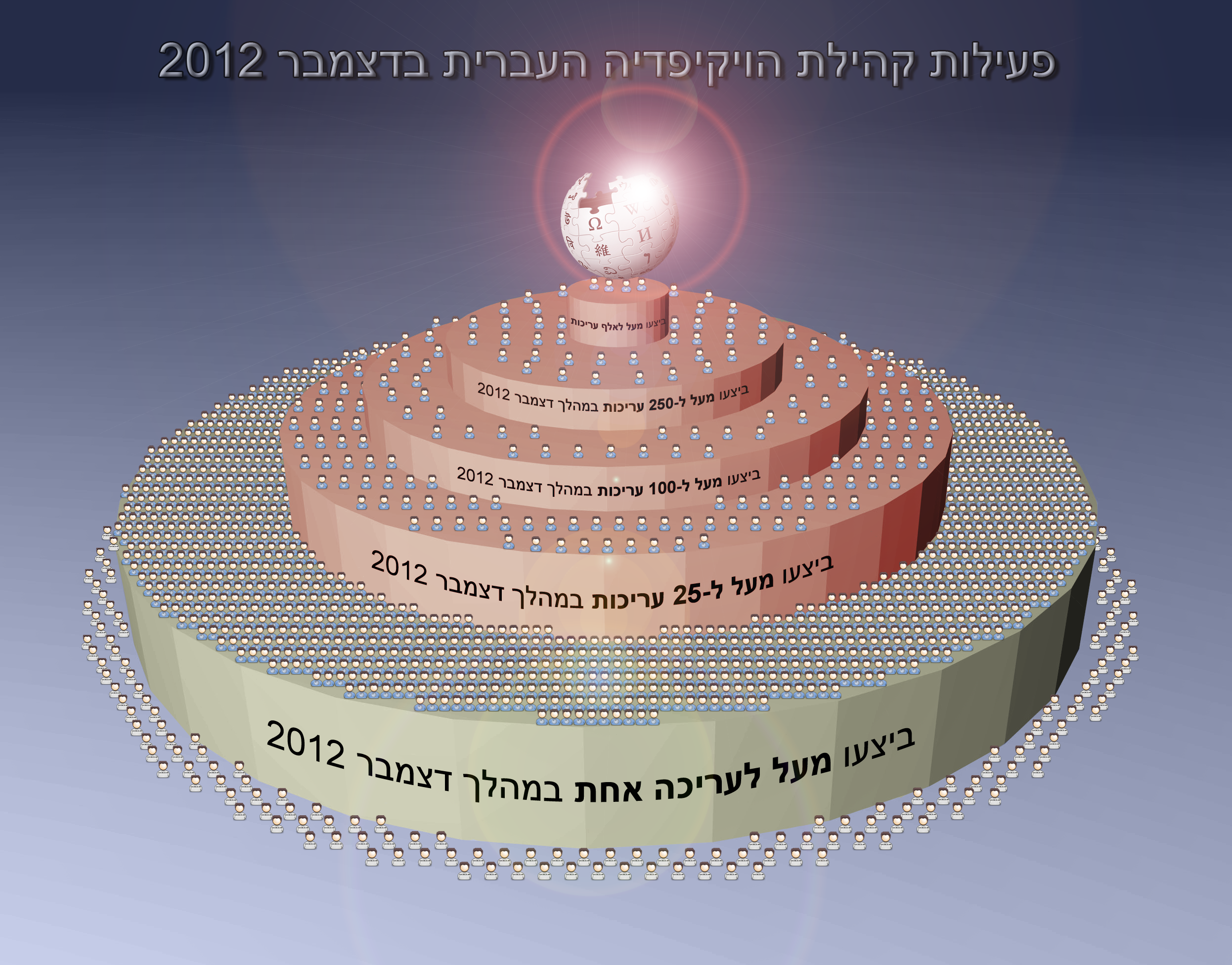 פעילות קהילת הויקיפדיה העברית בדצמבר 2012